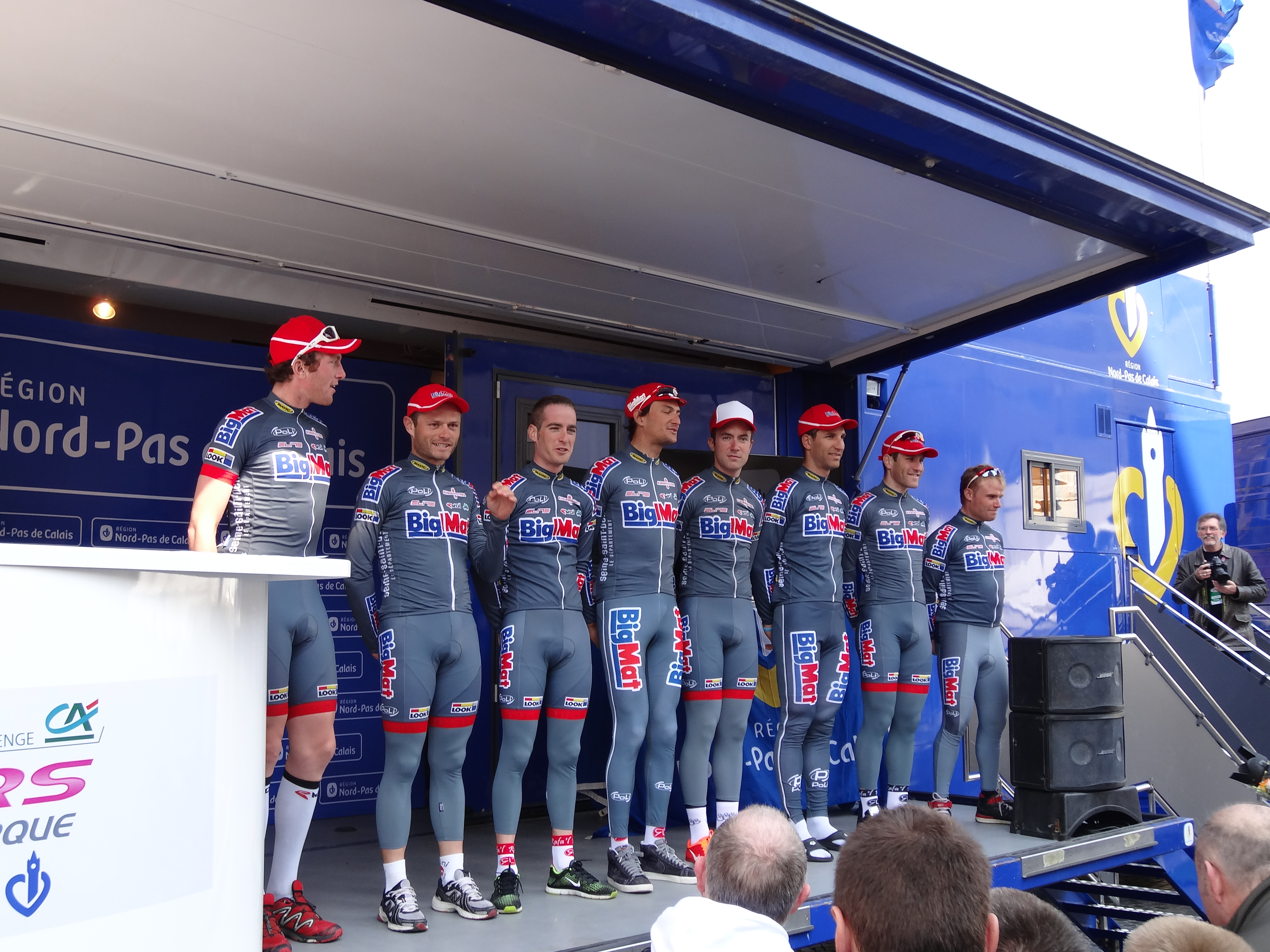 Reportage photographique réalisé le mercredi 1er mai 2013 au départ de la première étape de l'édition 2013 des Quatre jours de Dunkerque à Dunkerque, Nord, Nord-Pas-de-Calais, France. Le dossier photographique montre des véhicules de course exposés, la caravane publicitaire, la présentation des coureurs, et le départ. Depicted people: Romain Bacon, Steven Tronet, Théo Vimpère, Dimitri Le Boulch and Flavien Dassonville